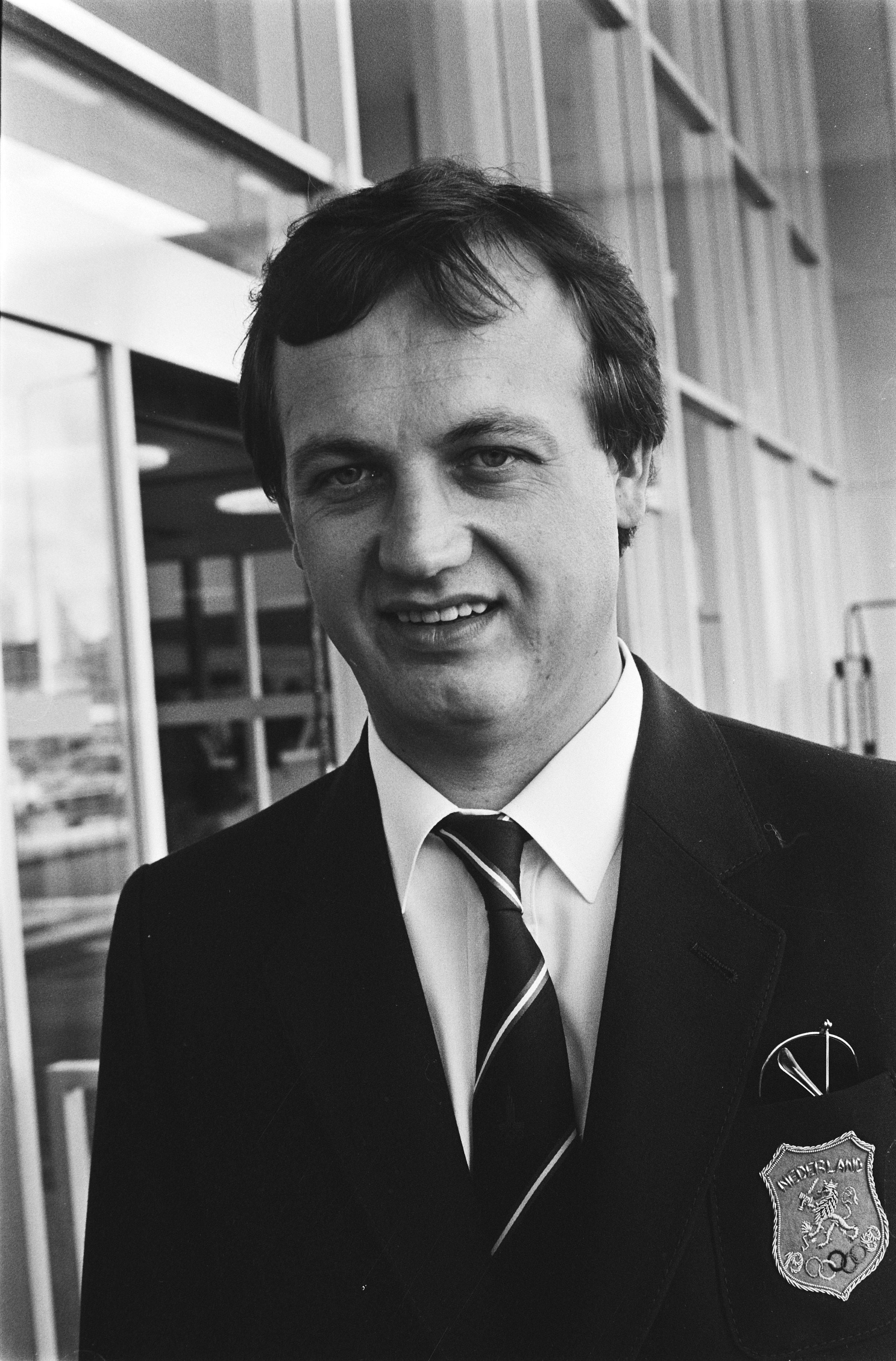 Collectie / Archief : Fotocollectie Anefo Reportage / Serie : Vertrek Olympische schuttersploeg van Schiphol naar de zomerspelen in Moskou Beschrijving : John Pierik Datum : 14 juli 1980 Locatie : Noord-Holland, Schiphol Trefwoorden : portretten, schietsport, sporters Persoonsnaam : Pierik, John Fotograaf : Pereira, Fernando / Anefo Auteursrechthebbende : Nationaal Archief Materiaalsoort : Negatief (zwart/wit) Nummer archiefinventaris : bekijk toegang 2.24.01.05 Bestanddeelnummer : 930-9183